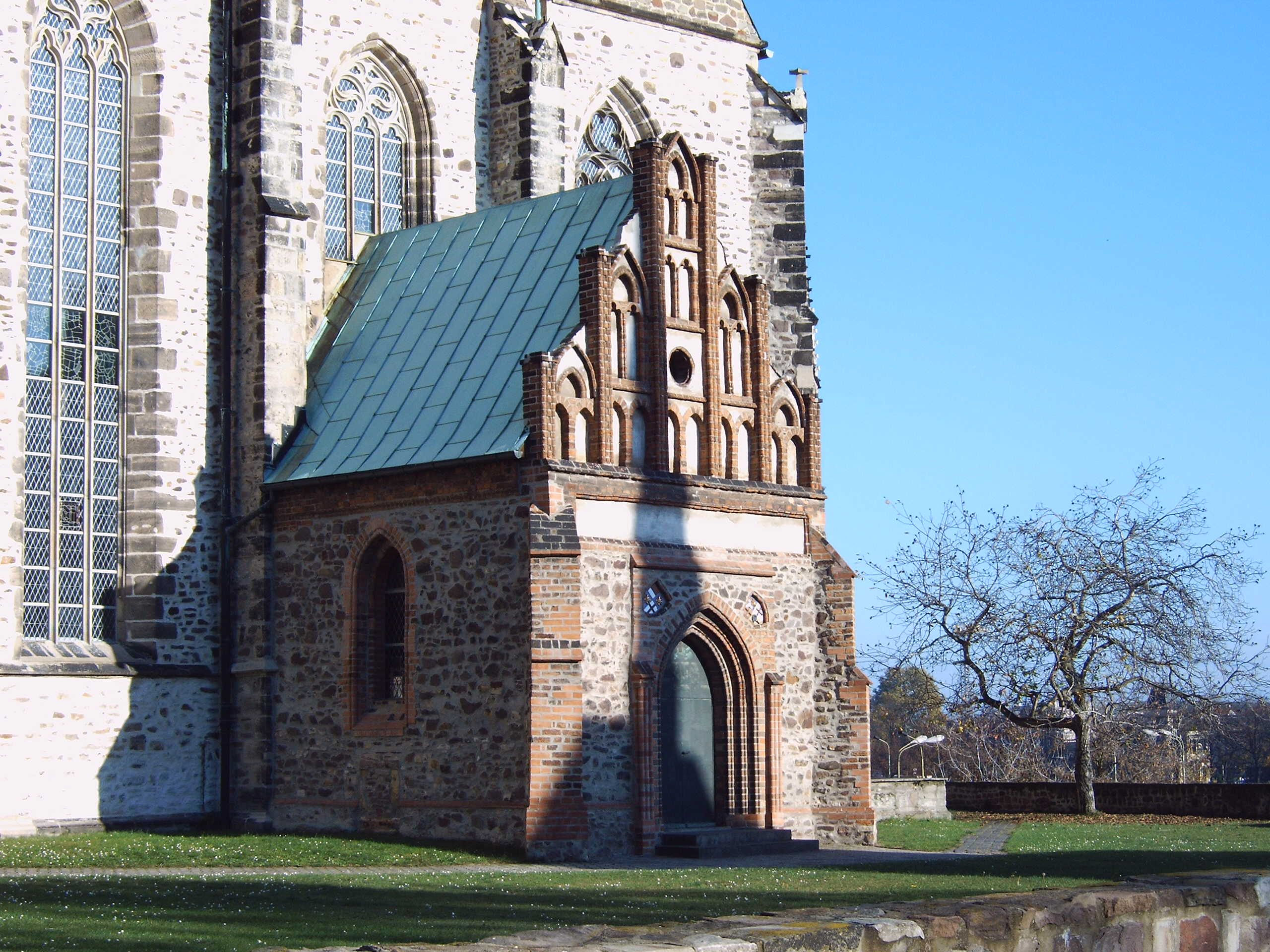 Sankt-Petri-Kirche Magdeburg, südliche Vorhalle, am 6.11.2005 aufgenommen durch Olaf2